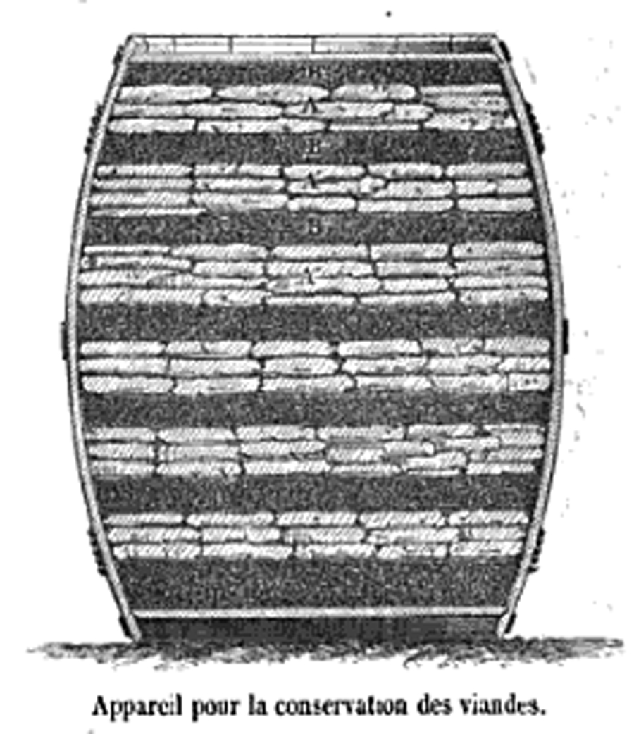 Citation du livre : Parmi les procédés signalés dans ces derniers temps, nous mentionnerons l'emploi de l'acide phénique, cet agent antiseptique dont les usages se sont rapidement multipliés. On prend un tonneau, et on le remplit de couches alternatives de la viande crue à conserver et de charbon concassé imbibé d'une solution d'acide phénique au millième. Notre figure représente la disposition de l'appareil : les couches de viandes A, A', A", sont séparées par des couches de charbon phéniqué B, B', B". Dans ce mode d'emballage, il est indispensable d'envelopper préalablement les morceaux de viande d'une toile légère qui les préserve du contact du charbon pulvérisé. Dans ces conditions, si le baril a été hermétiquement rempli de viande et de charbon phéniqué, la conservation sera au moins de la durée d'une année entière.